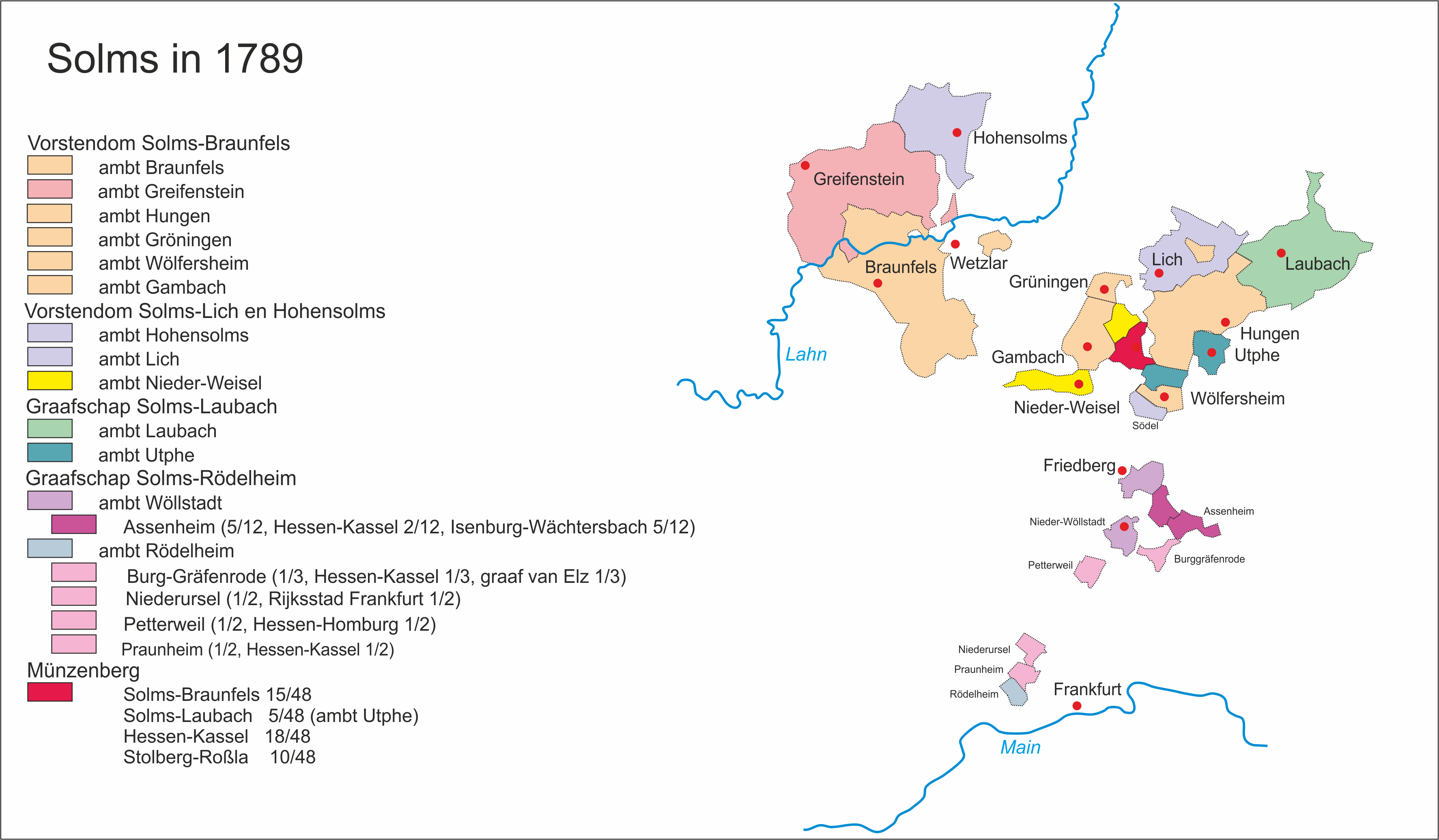 kaart van de administratieve indeling van Solms-Braunfels, Solms-Hohensolms-Lich, Solms-Laubach en Solms-Rödelheim